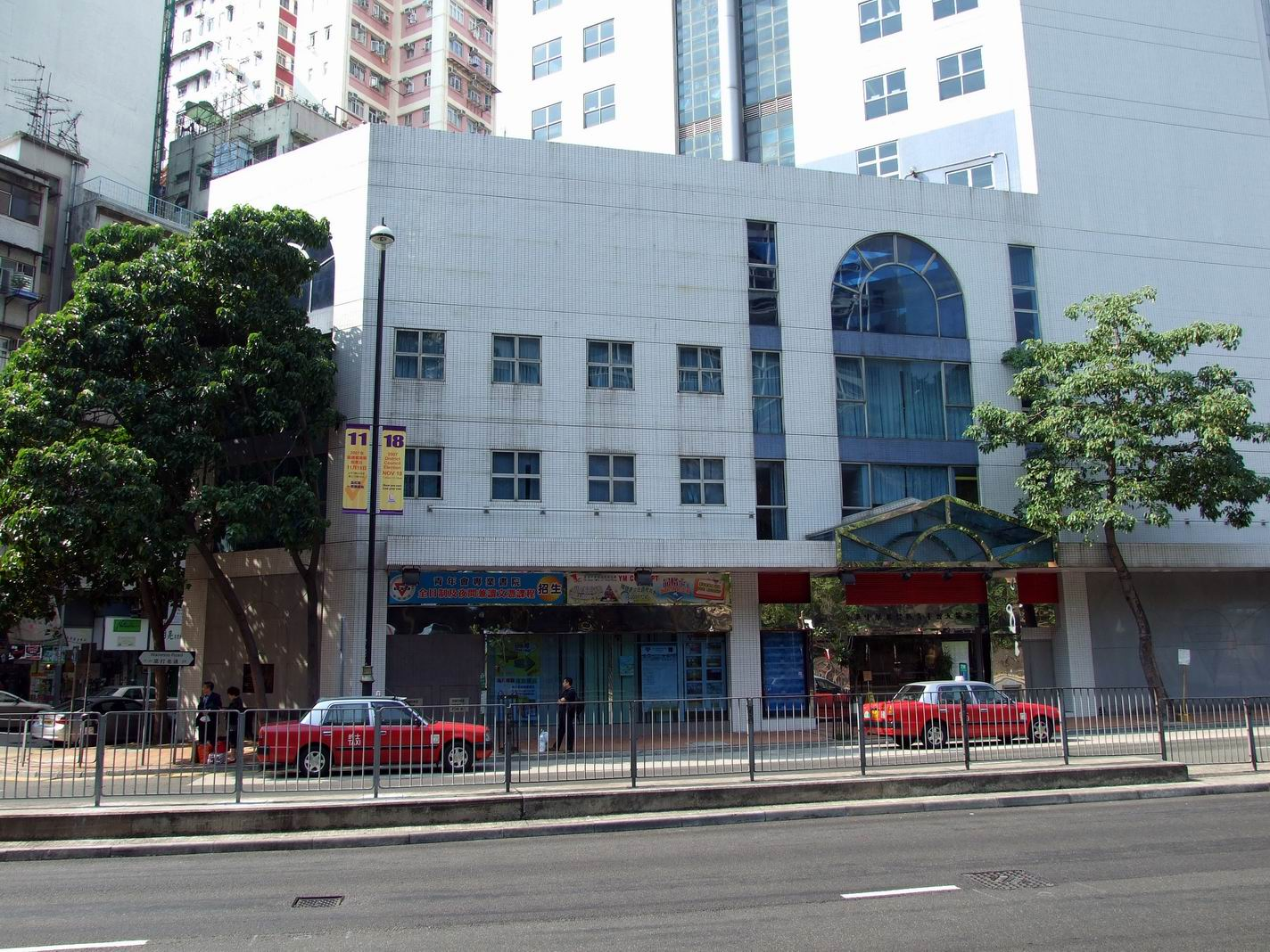 中華基督教青年會九龍會所